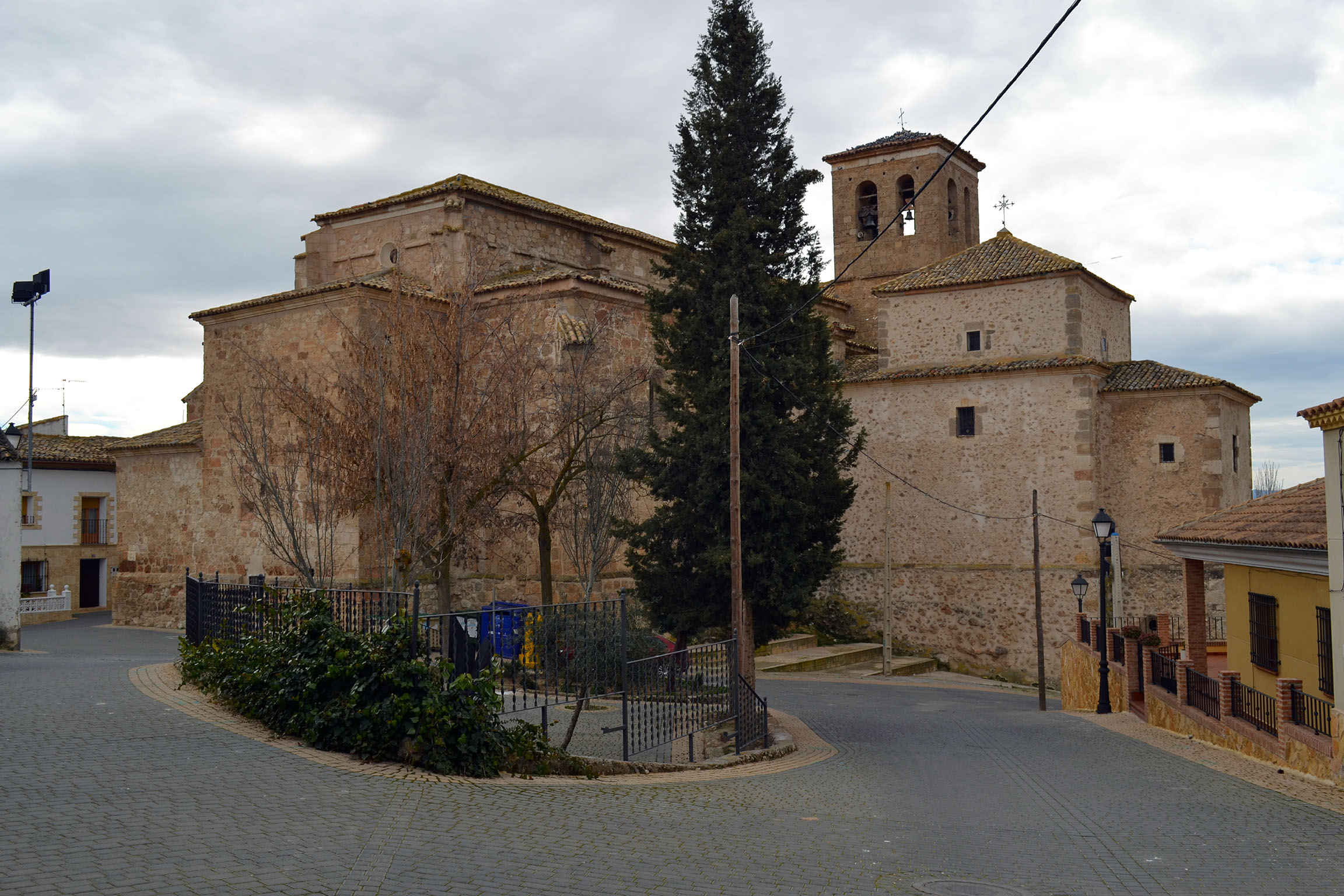 Iglesia de Nuestra Señora de la Asunción (Villalba del Rey, Cuenca)